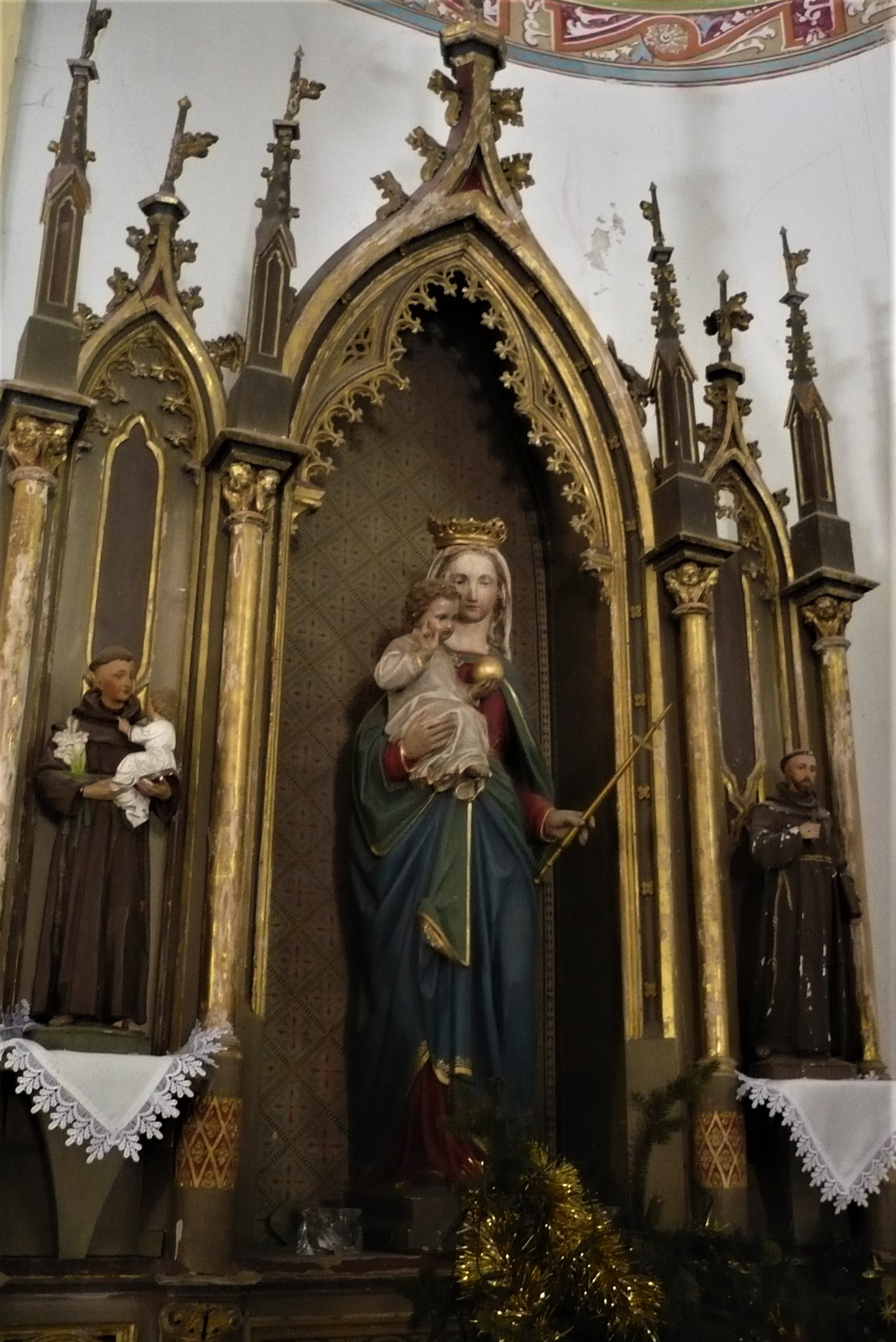 Ołtarz boczny